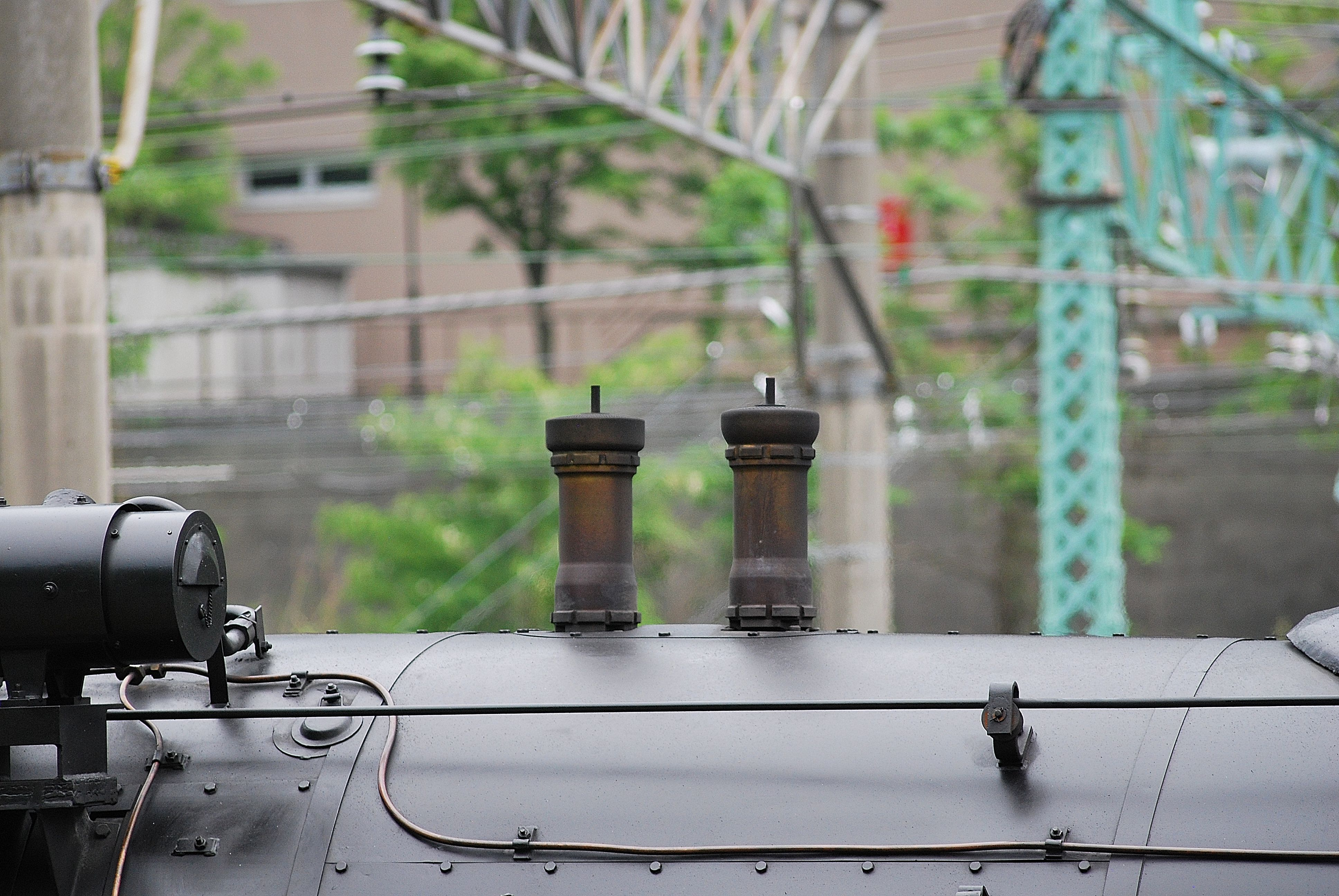 C61 20号機のボイラーの安全弁（敷地外から撮影）